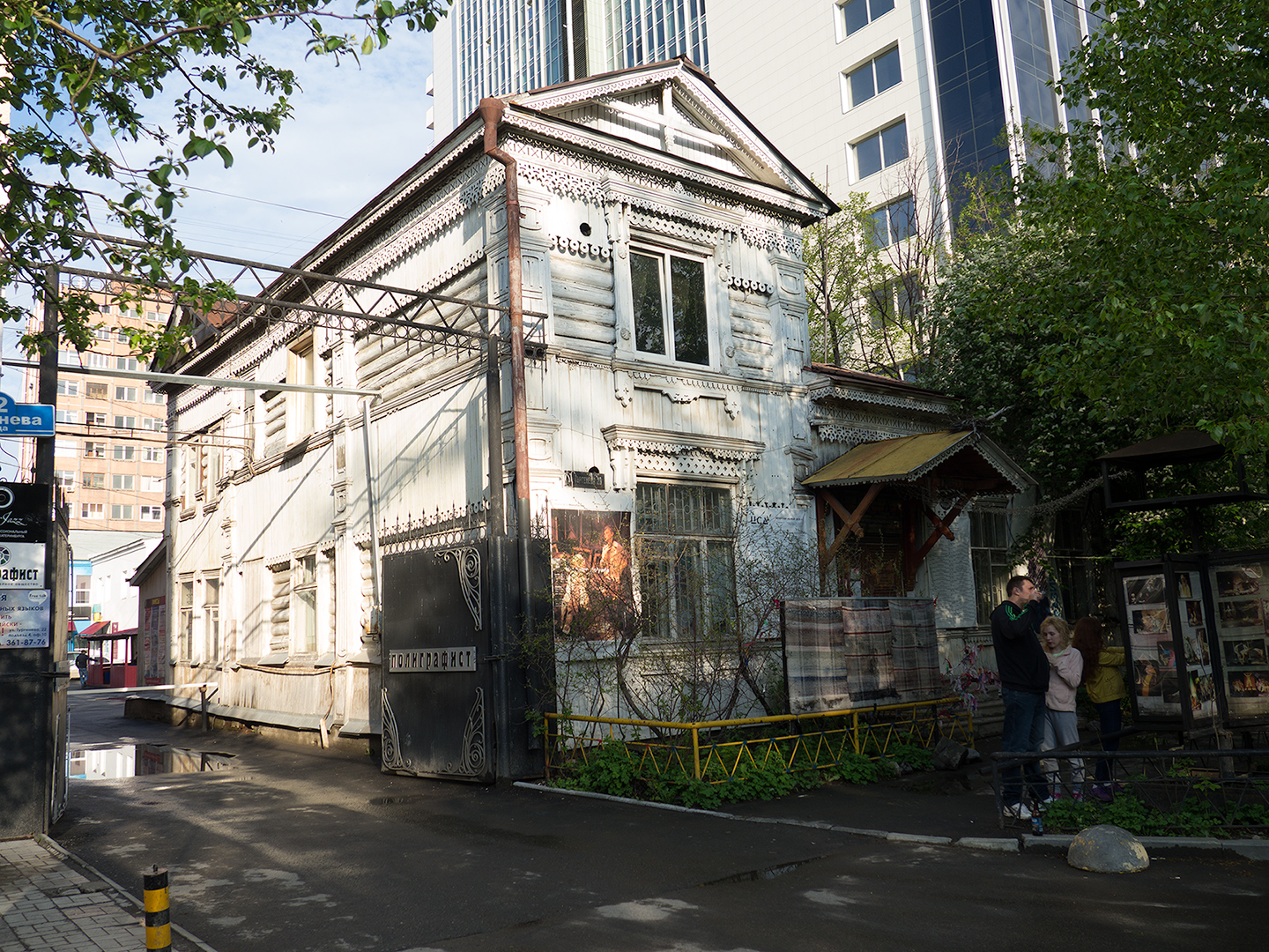 Екатеринбург: ул.Тургенева,20: бывший дом Н.И. Маева, ныне Центр современной драматургии; 17.05.2015